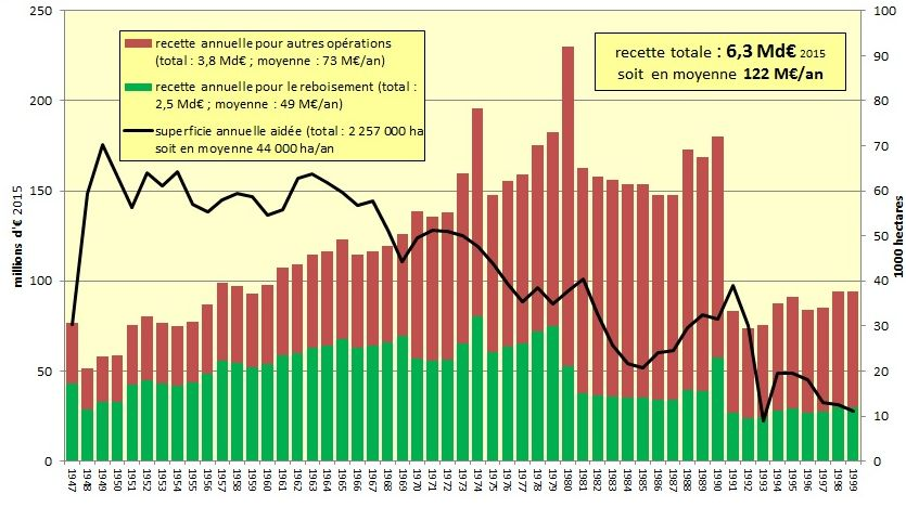 aides du Fonds forestier national d'après Dodane 2009 en euros actualisés 2015